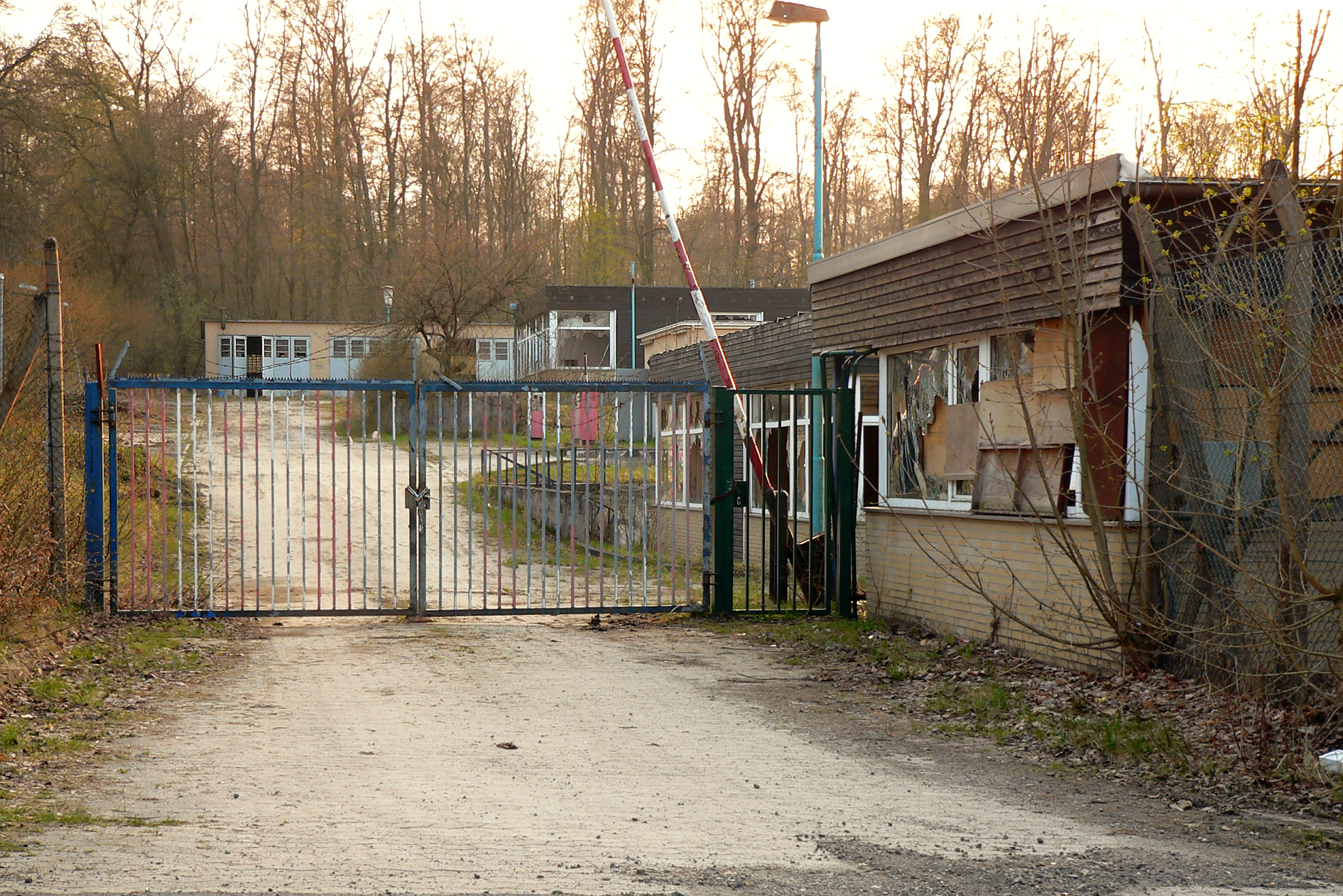 Langeleben Kaserne